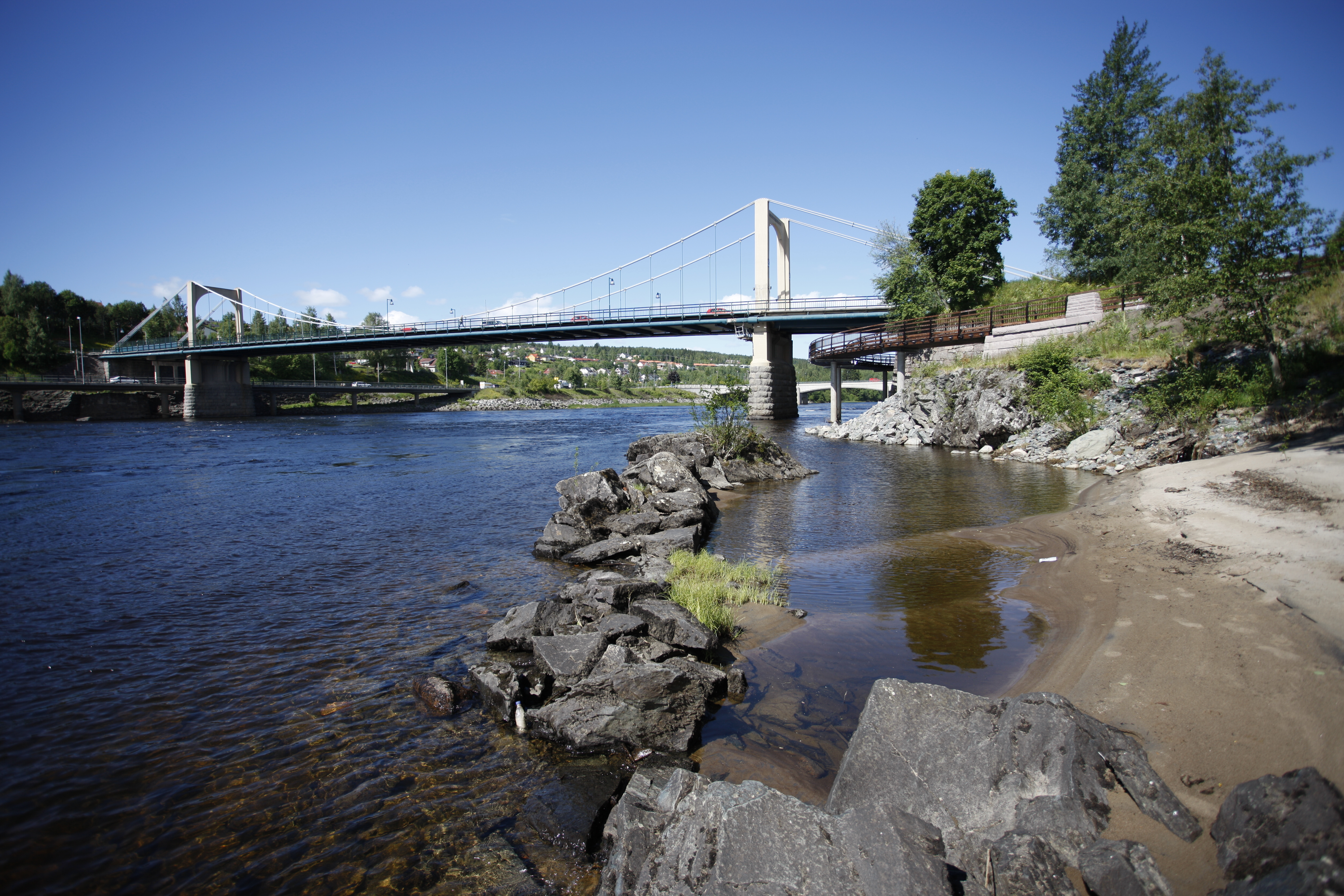 Gamlebrua og Glomma.